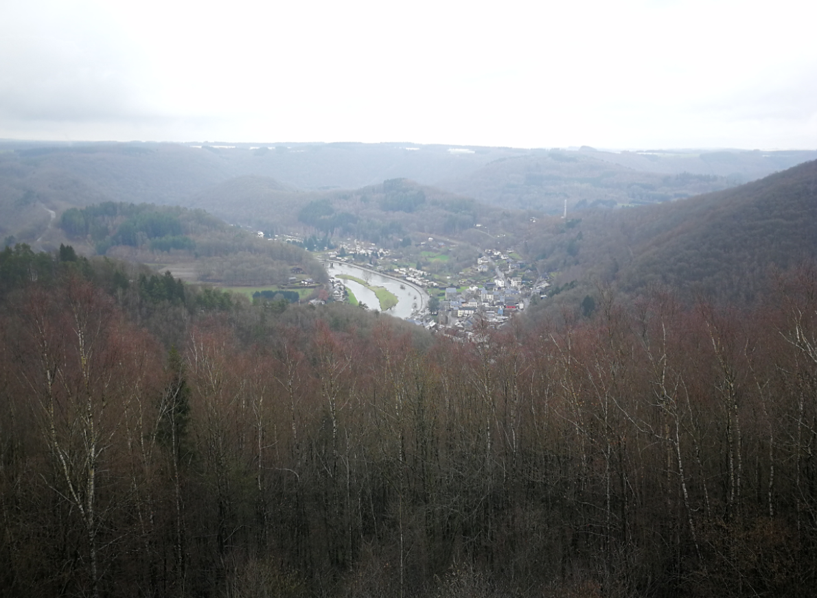 Zicht op Bohan vanaf uitkijkpunt